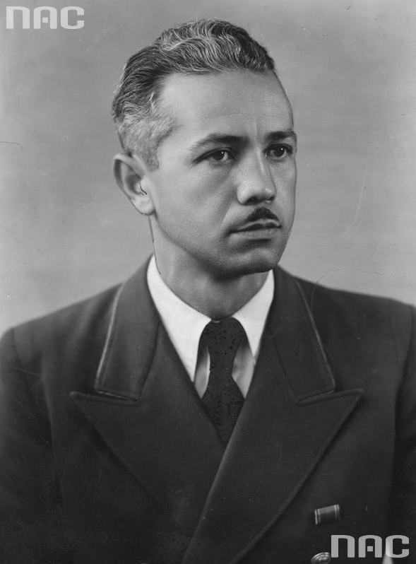 Kreishauptmann Egon Höller